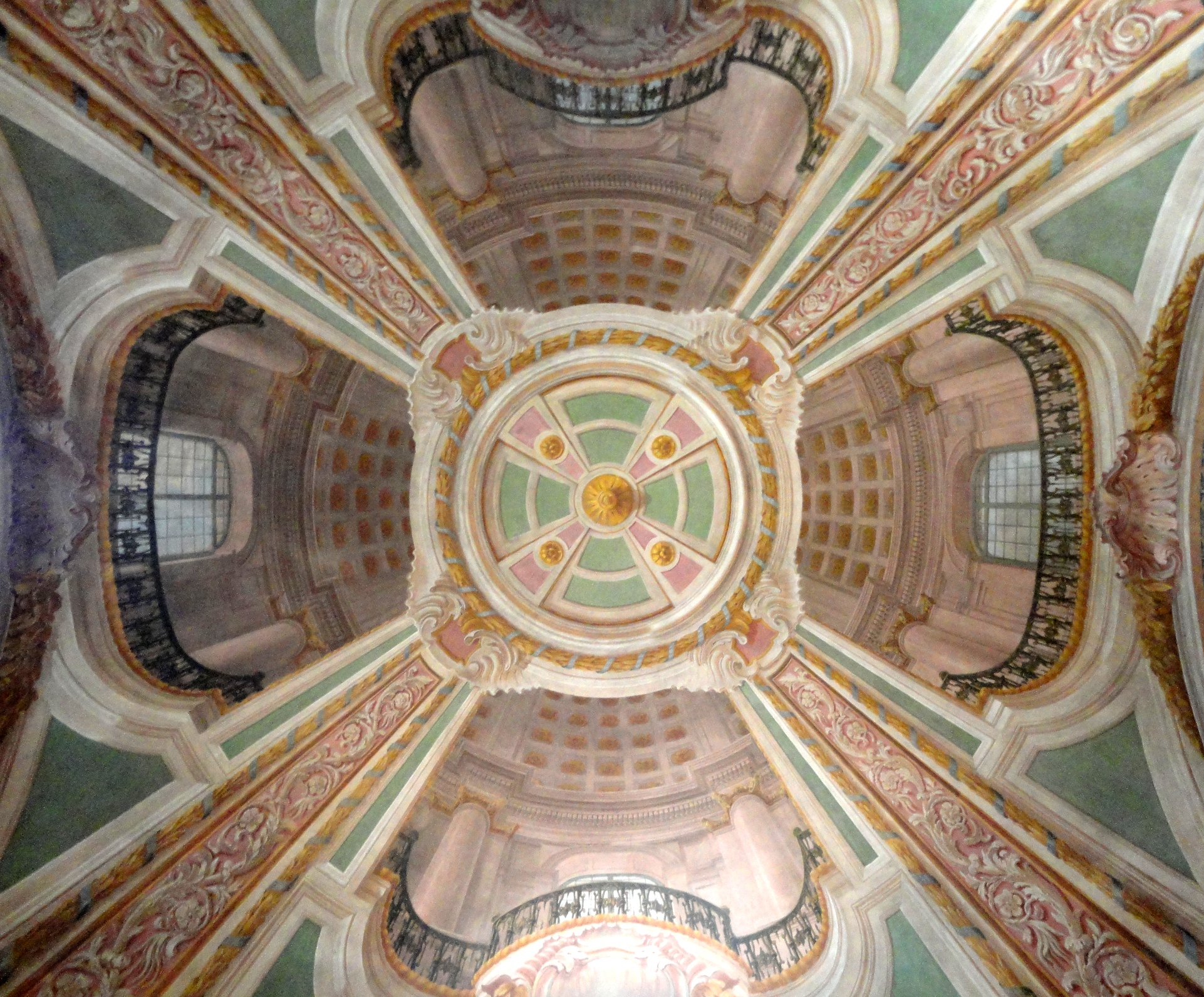 Cupola Chiesa di San Vittore Mauro